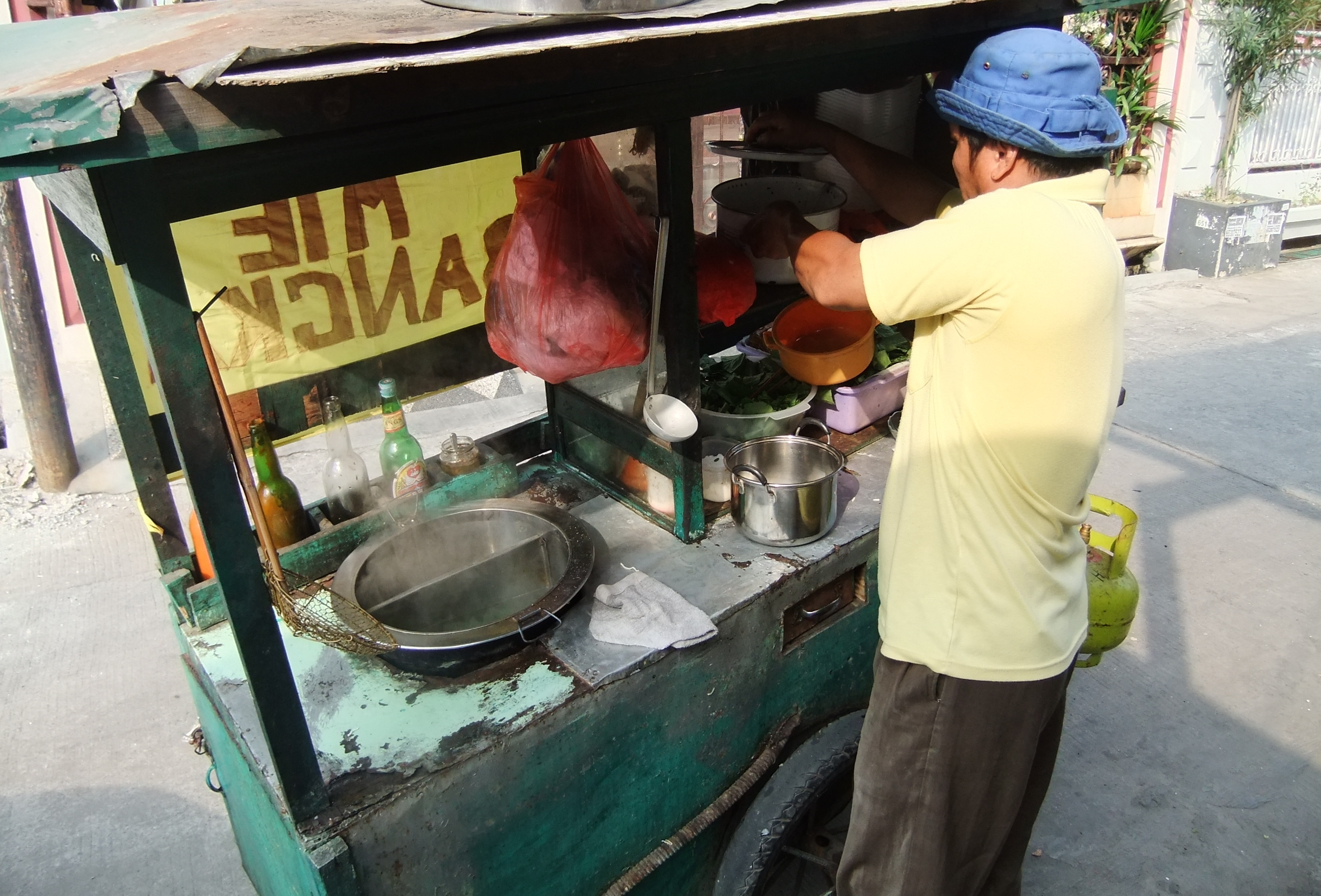 Pedagang keliling Mie Bangka